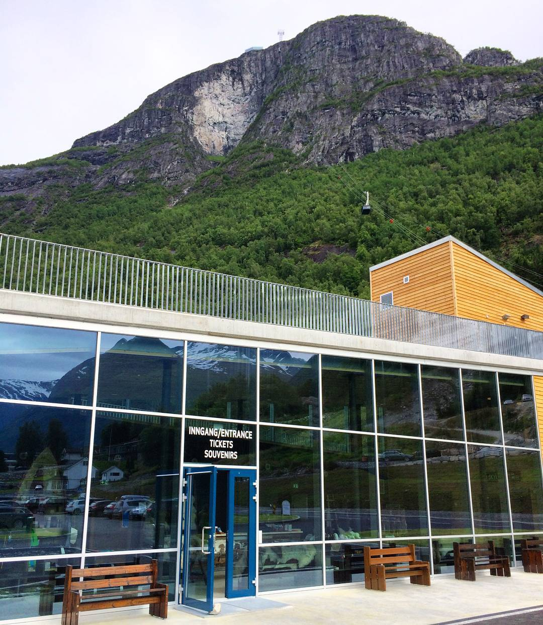 Butikk og billettkontor for Loen Skylift. Utsikt mot fjellet Hoven og pendelbanen.